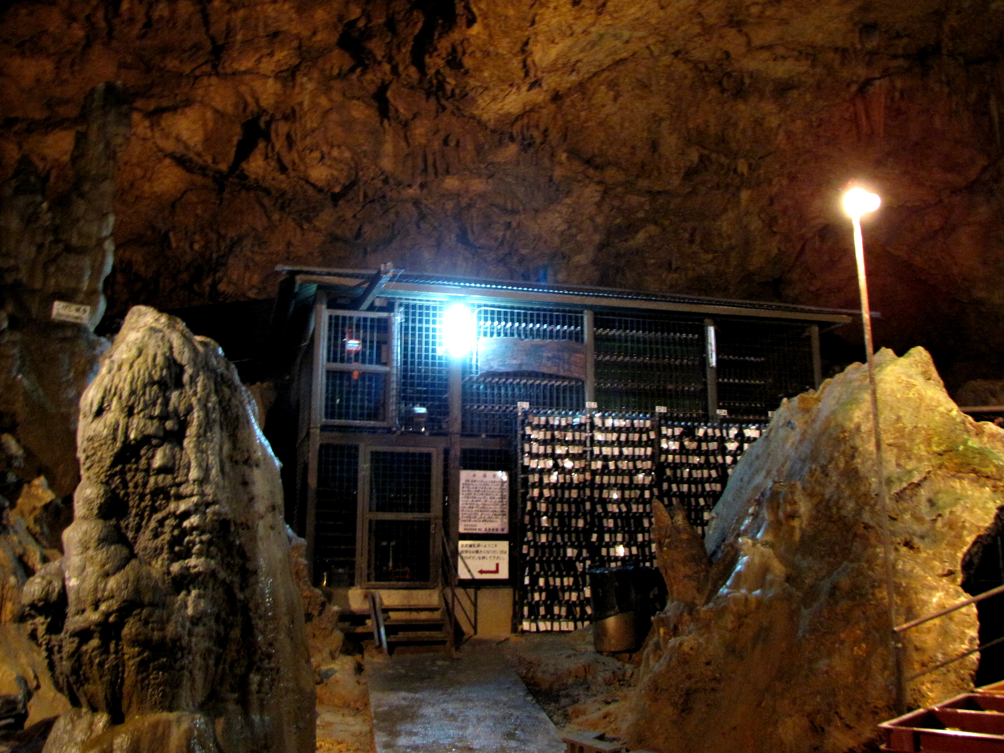 沖縄県金武町観音寺境内にある鍾乳洞「日秀洞」内部の泡盛の酒蔵。